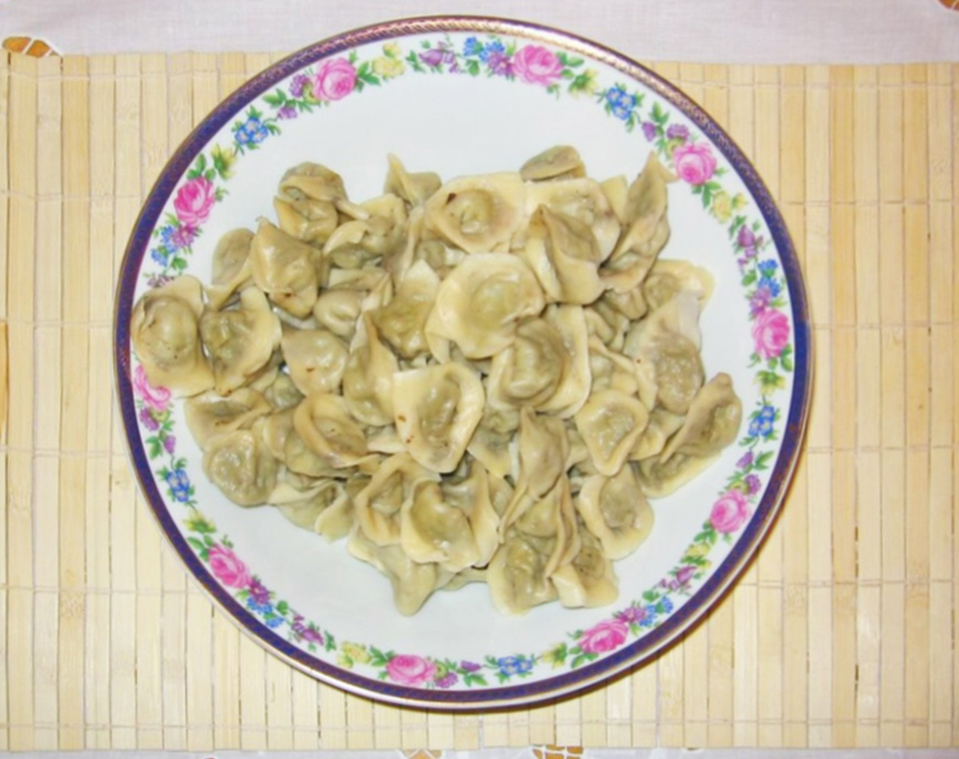 Uszka przed dodaniem do barszczu wigilijnego